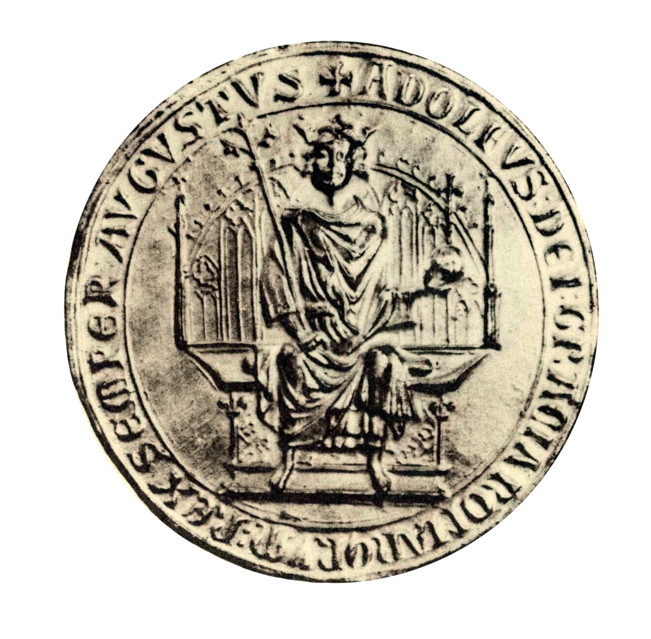 Siegel Adolfs von Nassau, genaue Beschreibung: Die Siegel der Deutschen Kaiser und Könige:Band 5:Seite 34, Nr. 5